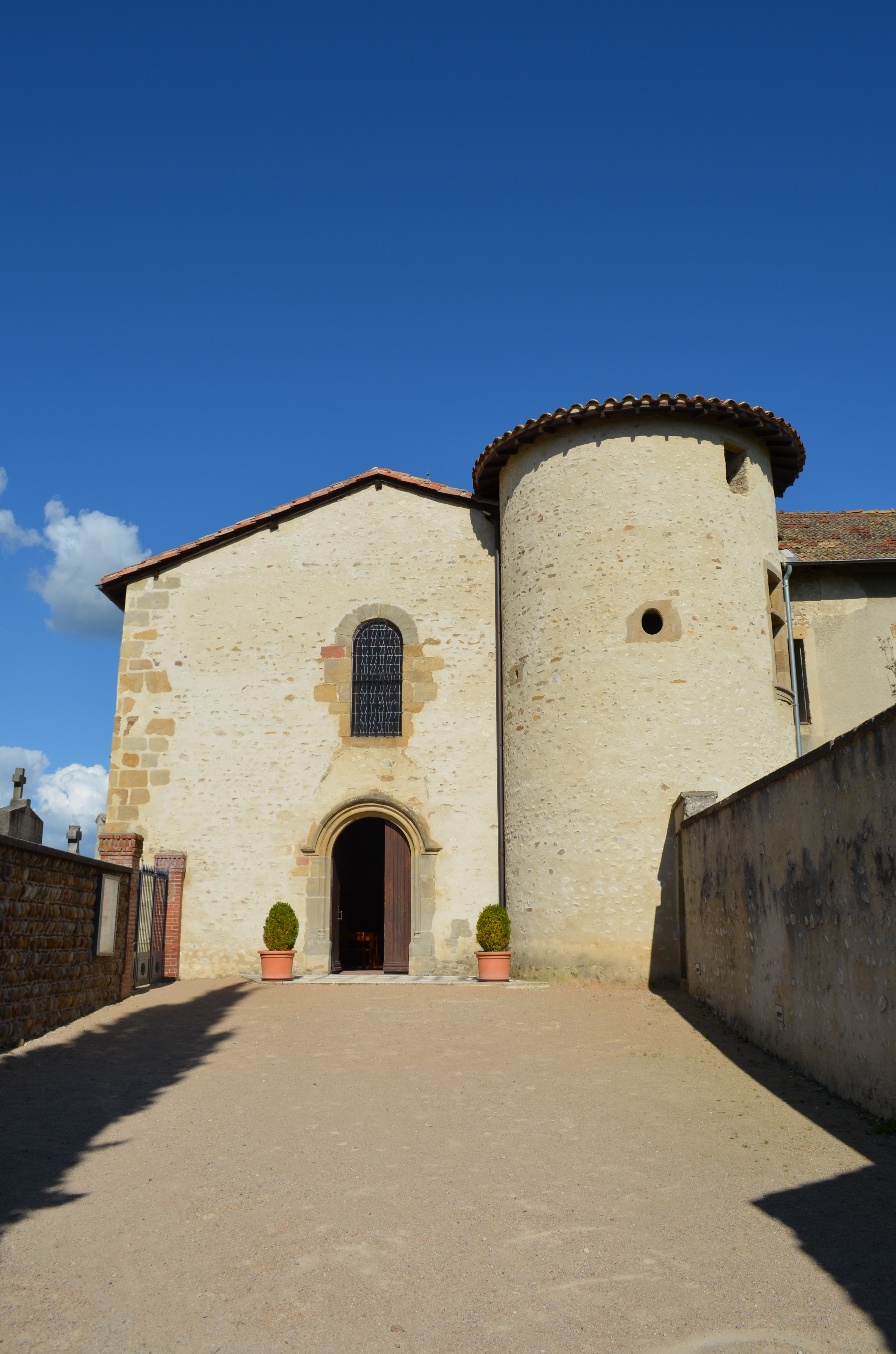 Façade de l'église de Tourdan à Revel-Tourdan, Isère (France).